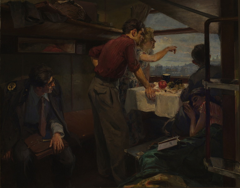 Папян Анатолий Лазаревич (1924-2007), 1953 Холст, масло Национальная галерея Армении